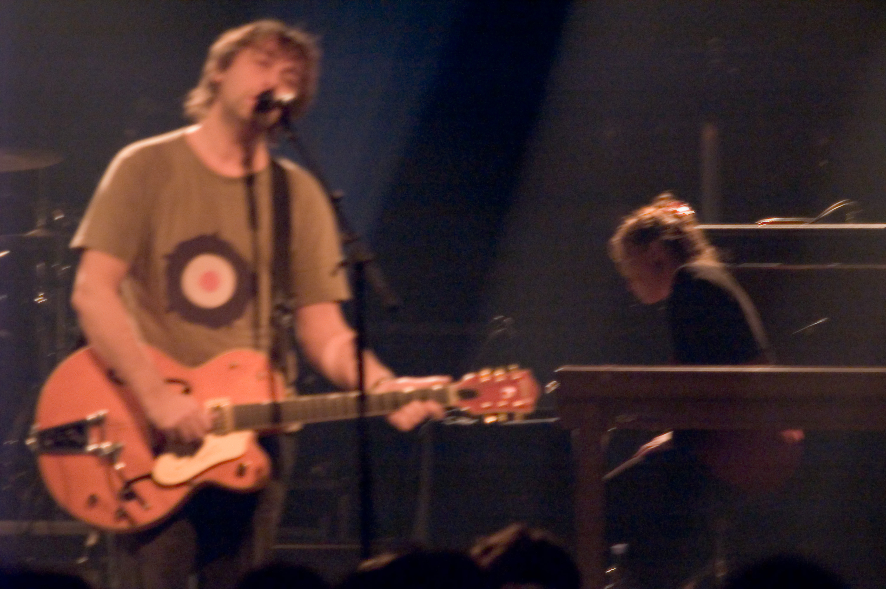 Yann Tiersen en concert le 25 novembre 2005 à Fri-son, Fribourg, Suisse.